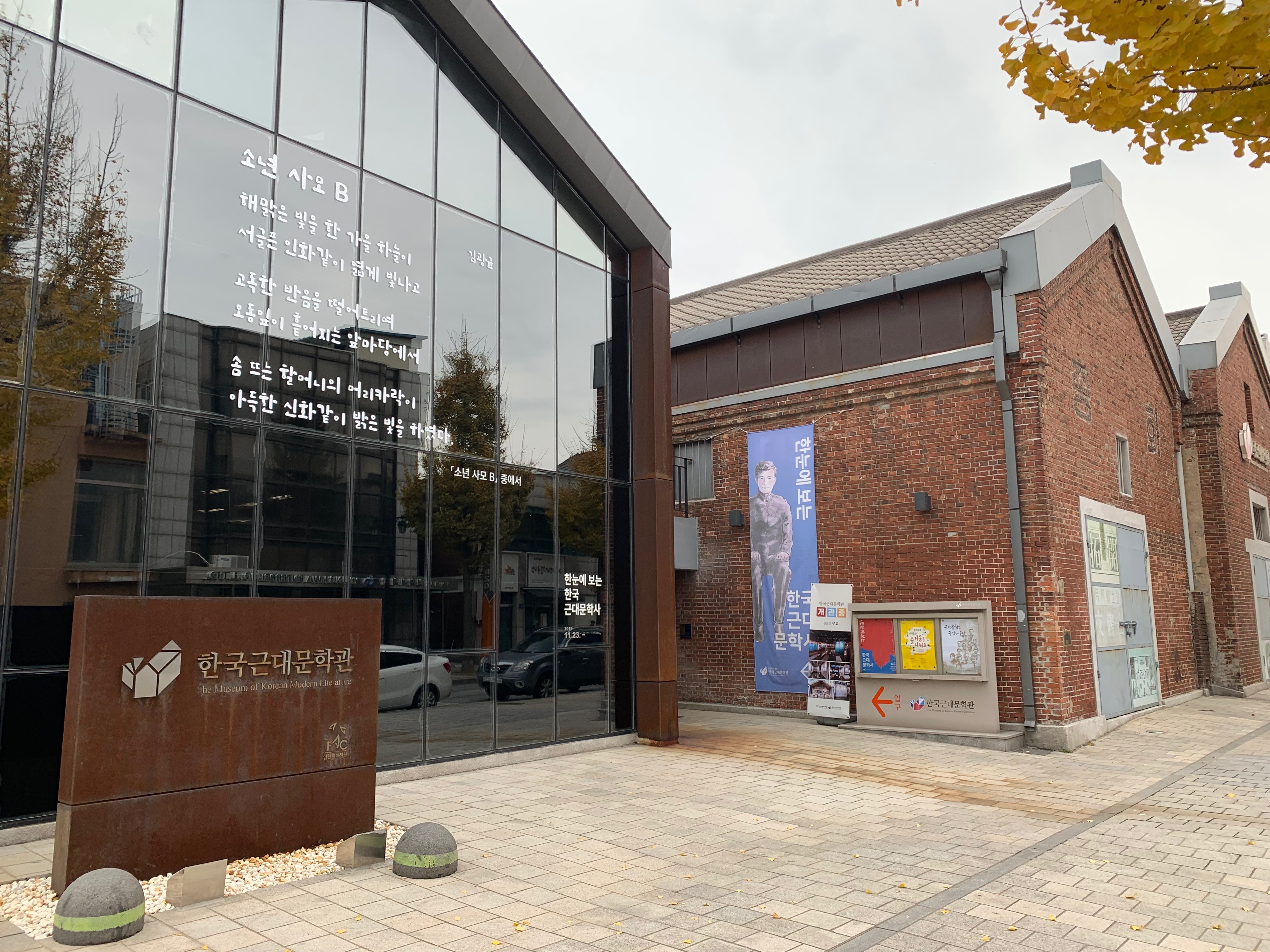 한국근대문확관